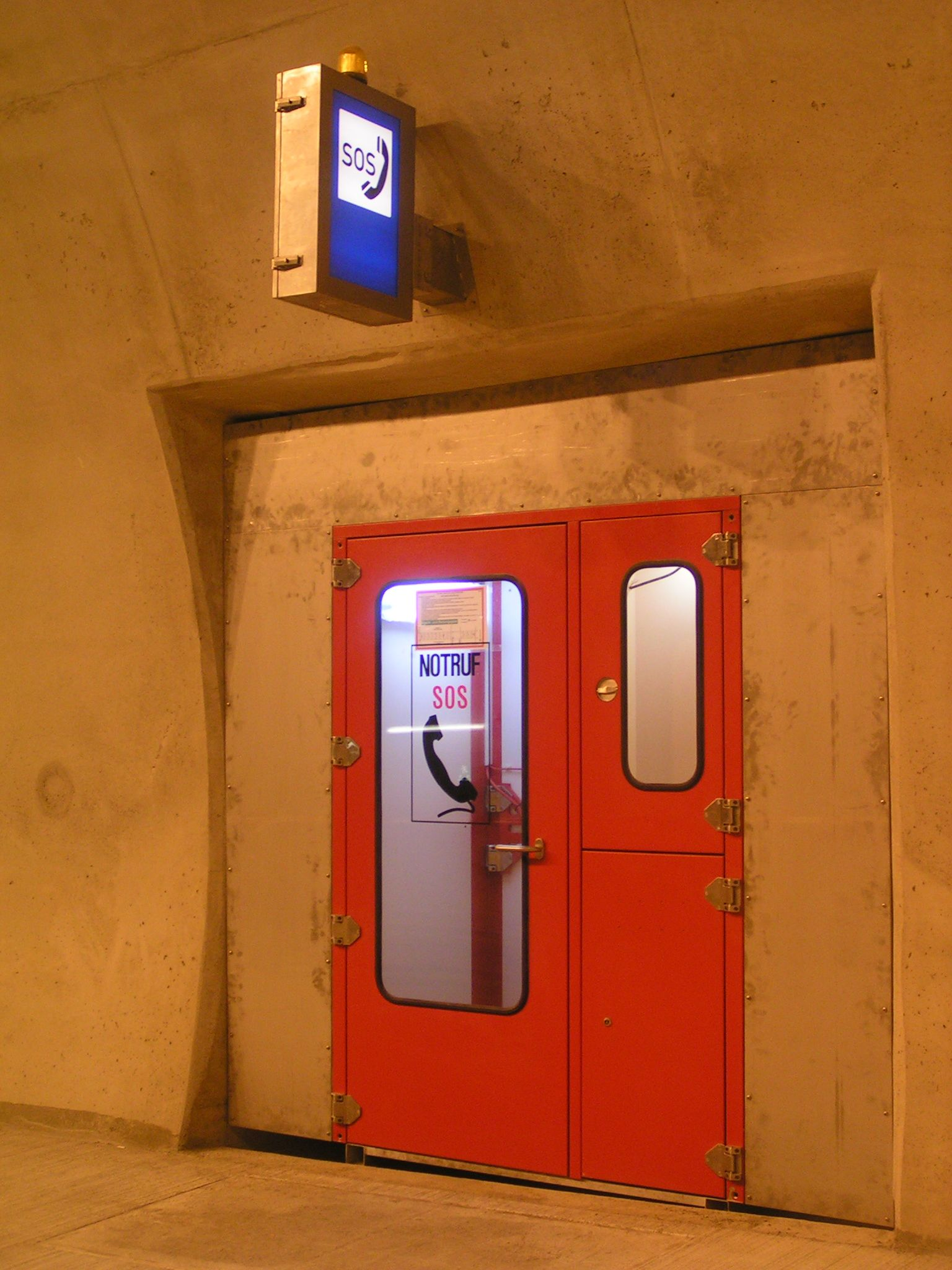 Notrufnische im Dölzschener Tunnel der A17 bei Dresden